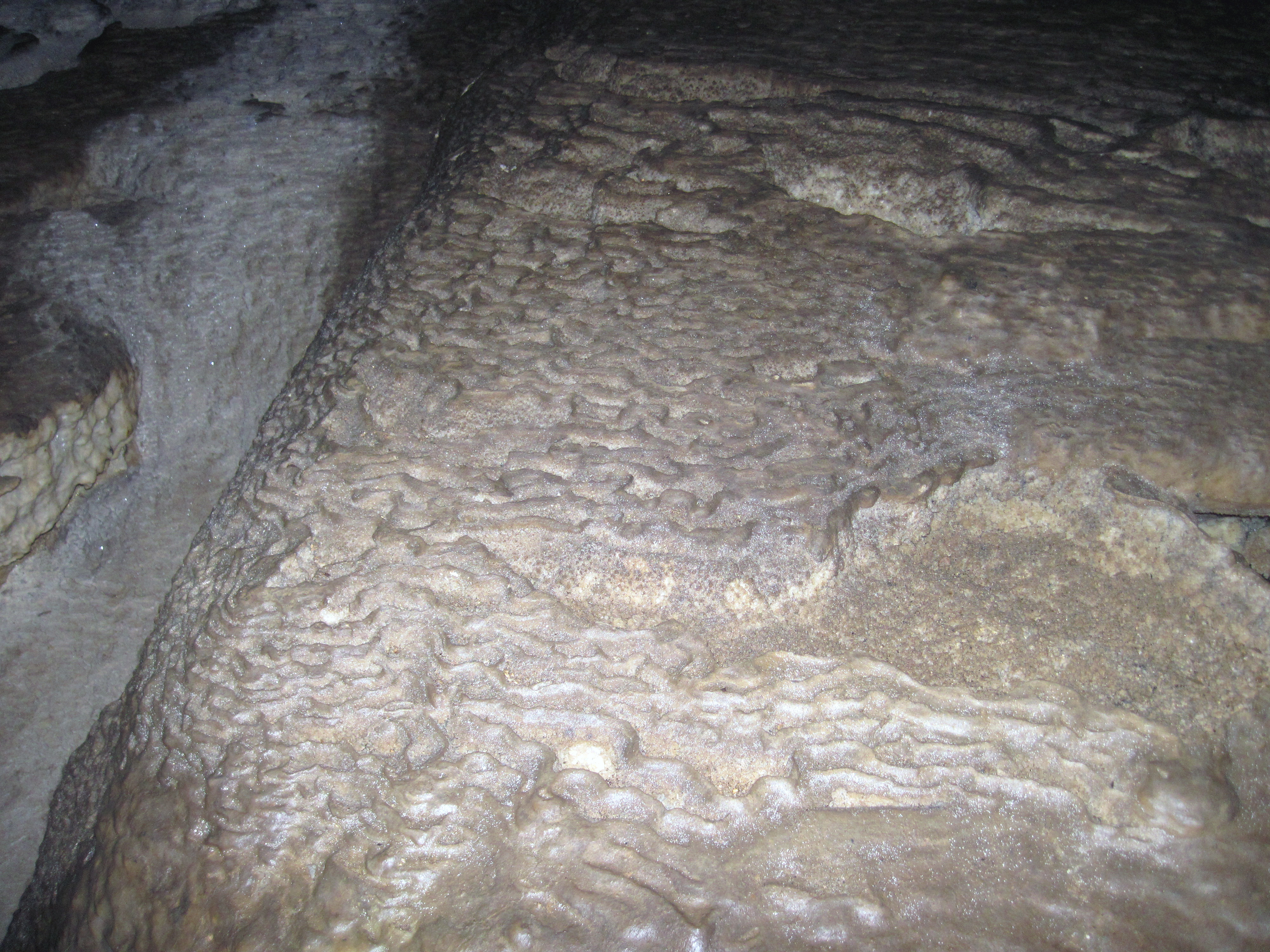 Microgours 2